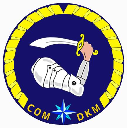 Centrum Operacji Morskich - Dowództwo Komponentu Morskiego – oznaka rozpoznawcza na mundur wyjściowy – 2015, Polska.